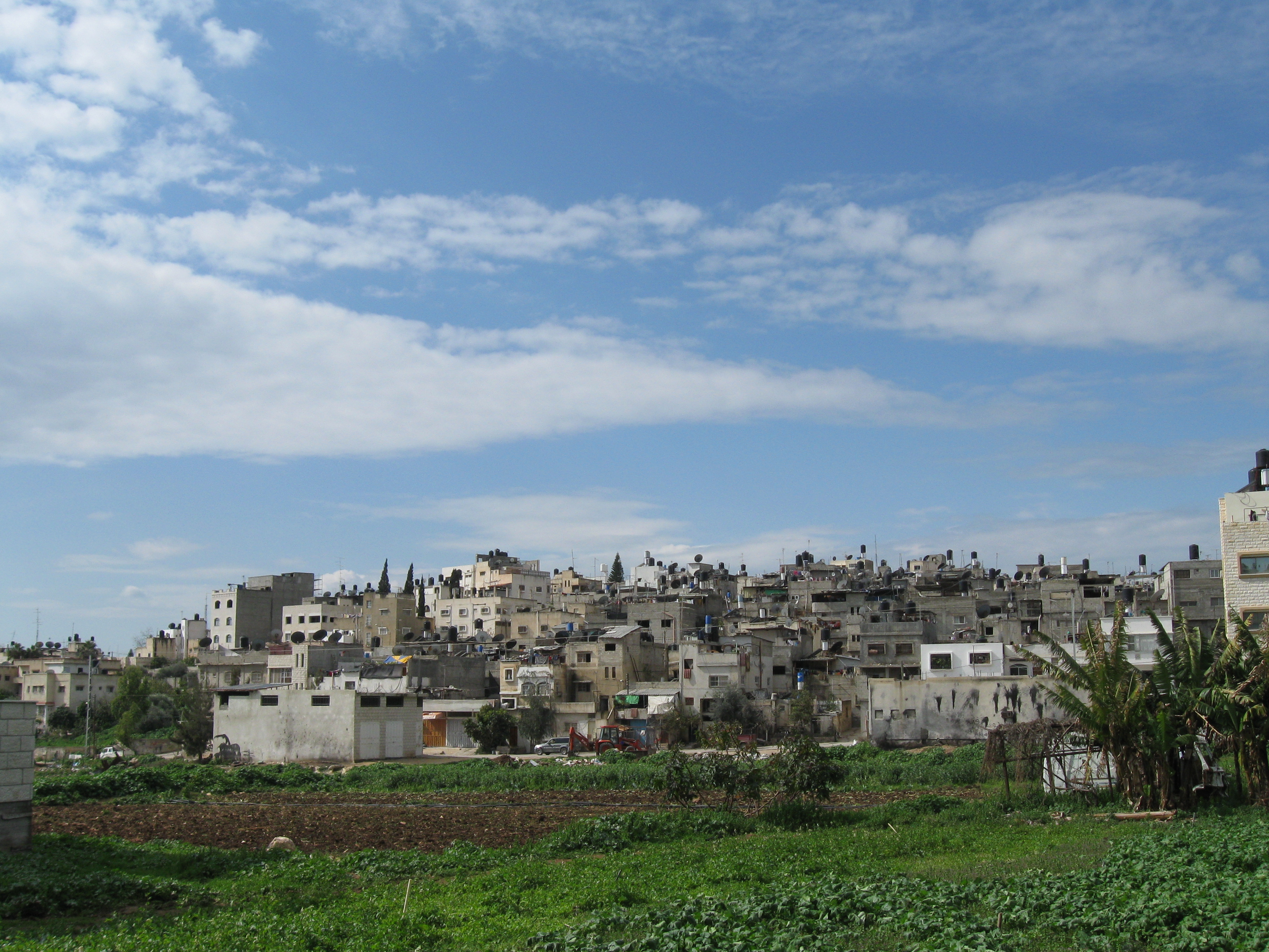 مربعة حنون مخيم طولكرم